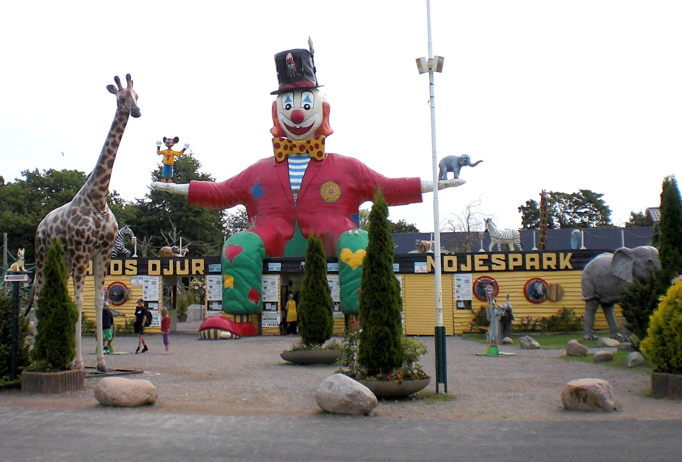 Eingang zum Tier- und Vergnügungspar Öland